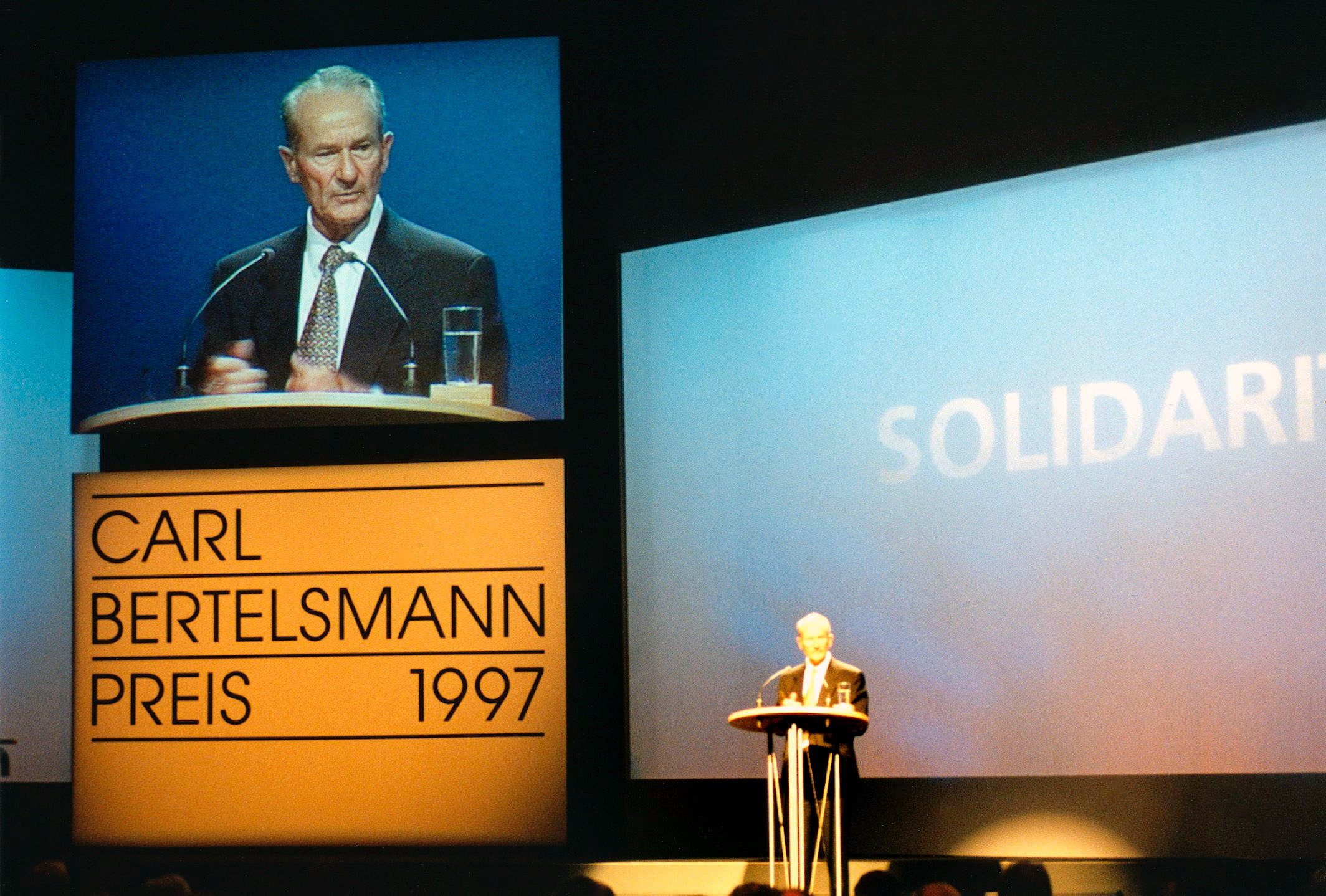 Reinhard Mohn bei der Verleihung des Carl Bertelsmann-Preises in der Stadthalle Gütersloh